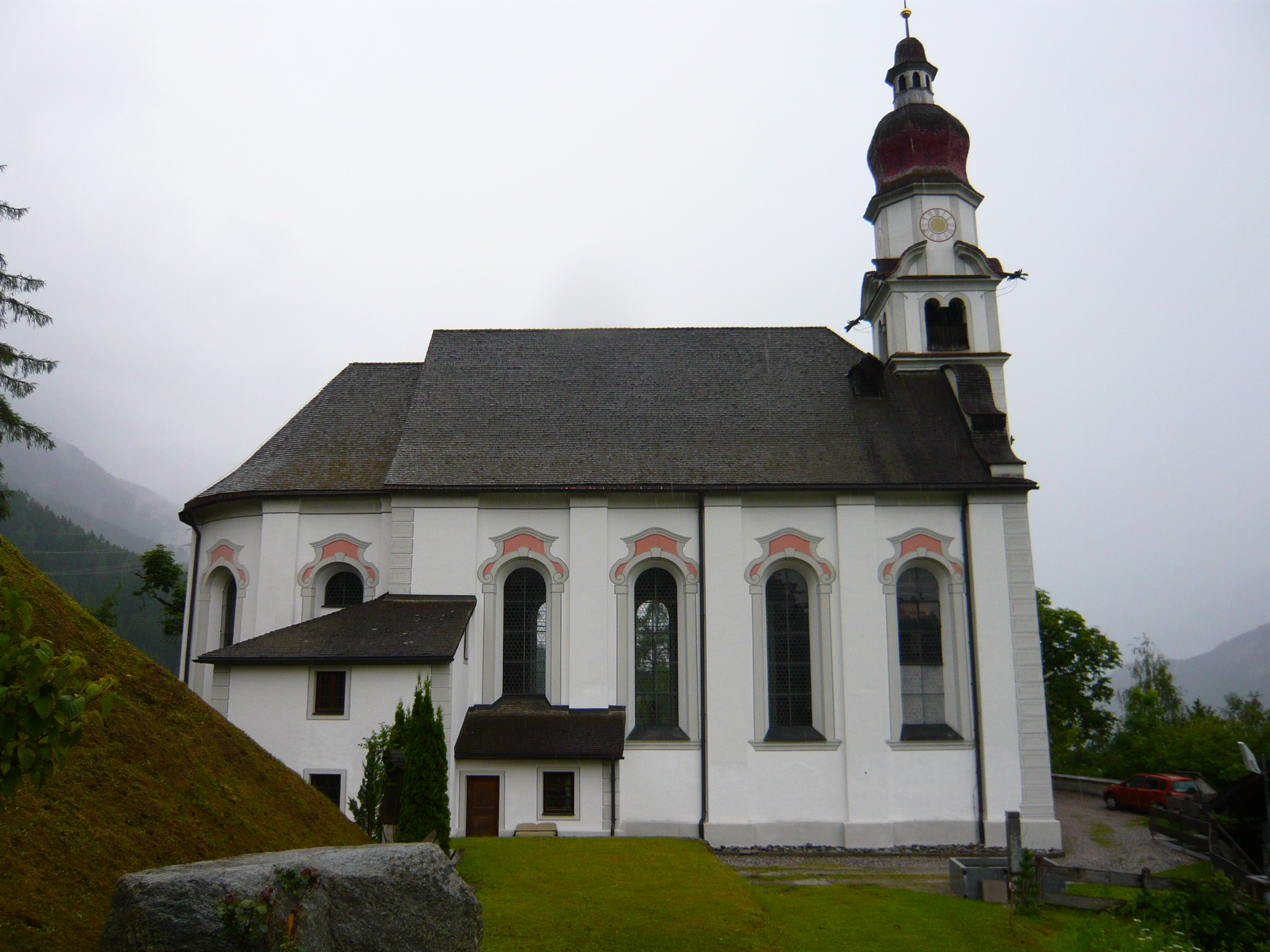 Wallfahrtskirche hl. Antonius von Padua - Wegscheide 56, Rietz